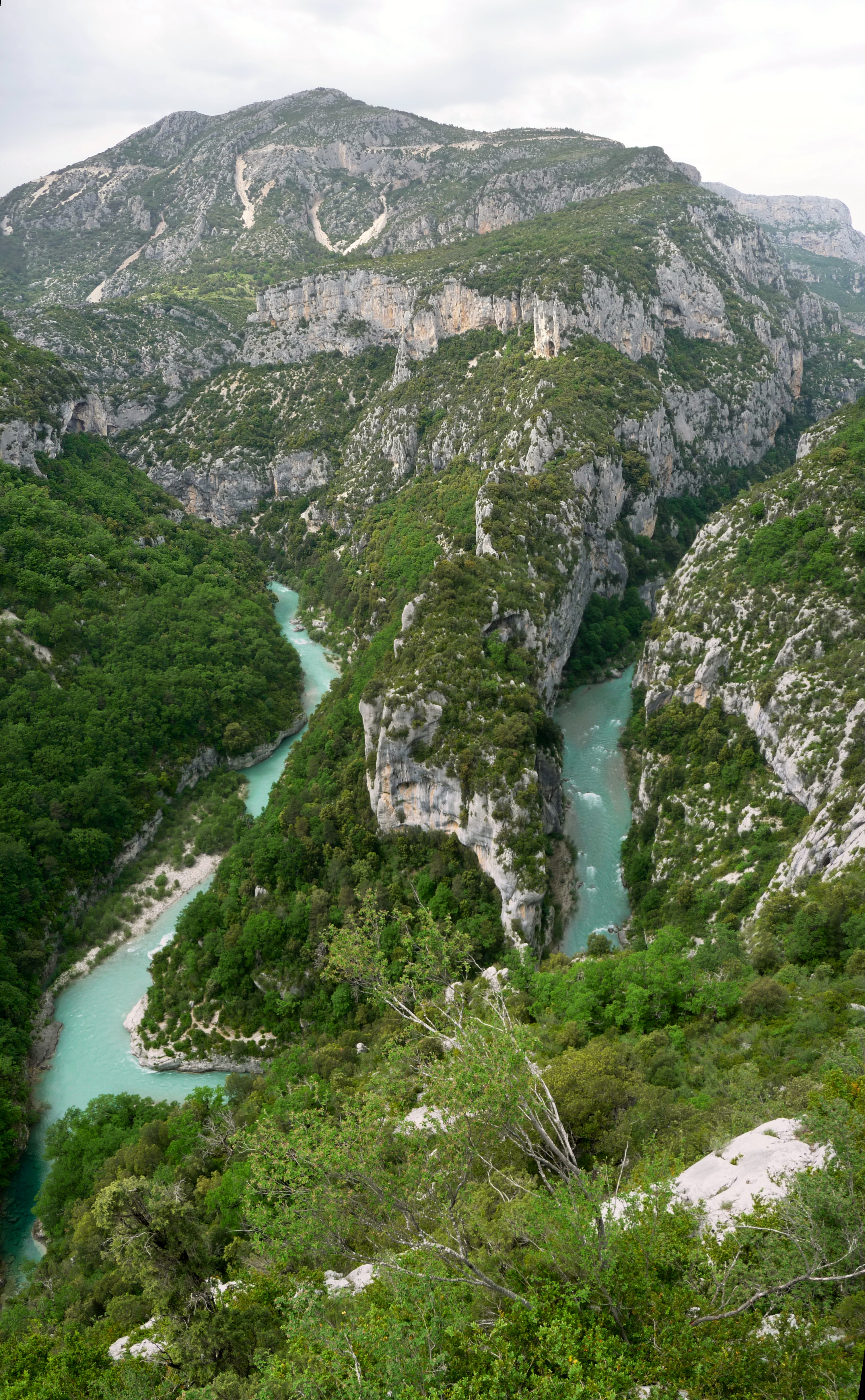 Gorge de Verdon